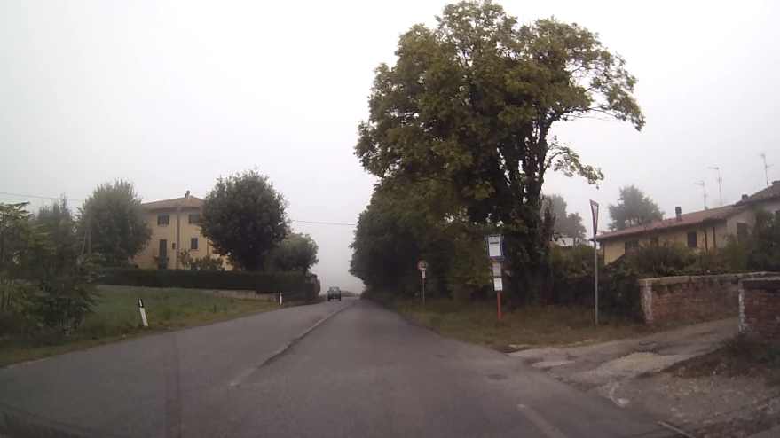 Borgo San Lorenzo, frazione Battiloro